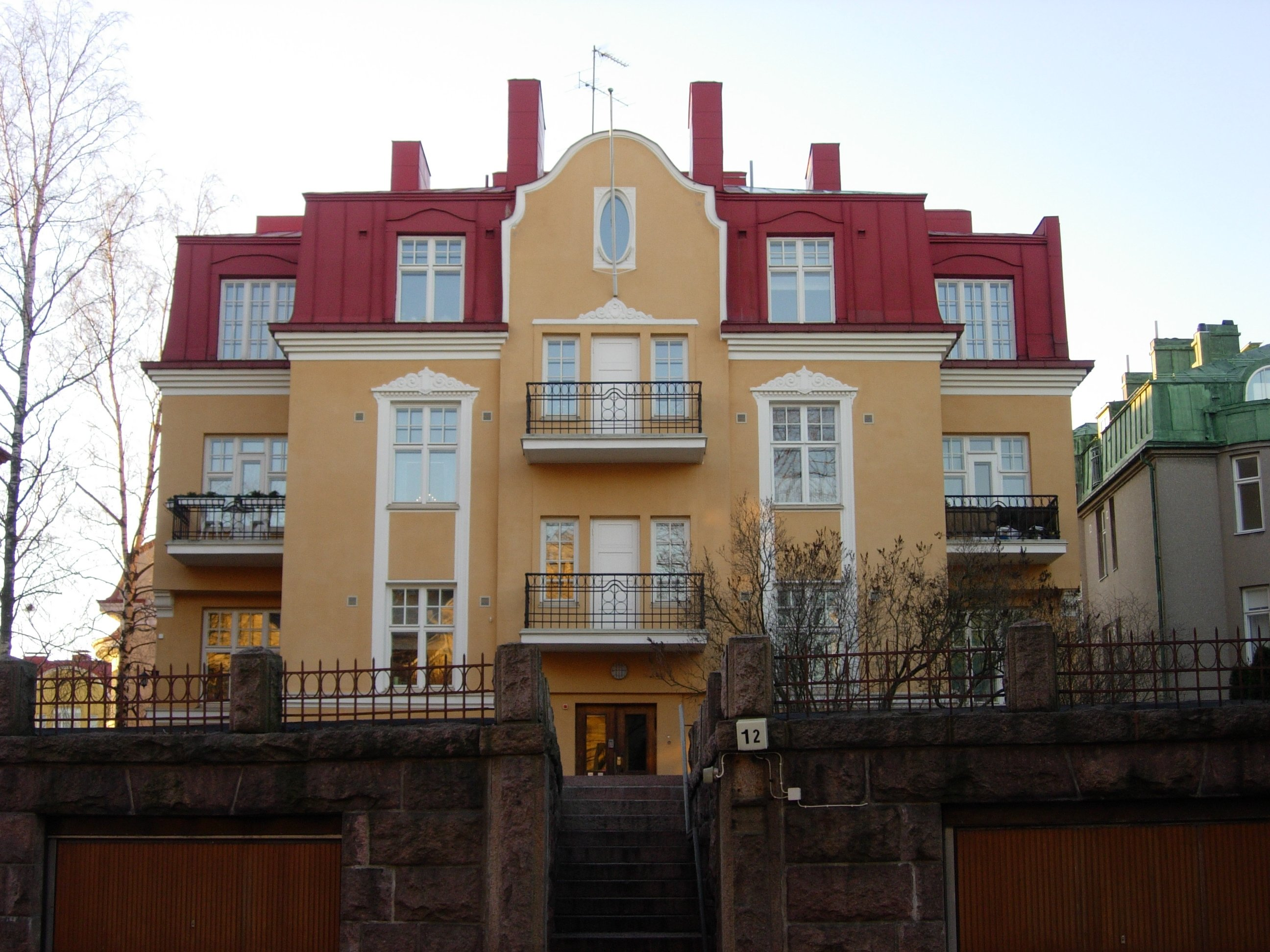 Armfeltintie 12, Helsinki, Eira. Arkkitehti: John Wikander. Rakennusvuosi: 1914.